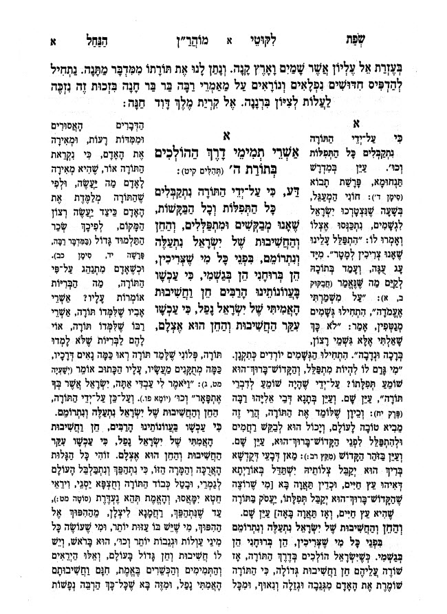 ליקוטי מוהרן תורה א - עם פירוש שפת הנחל